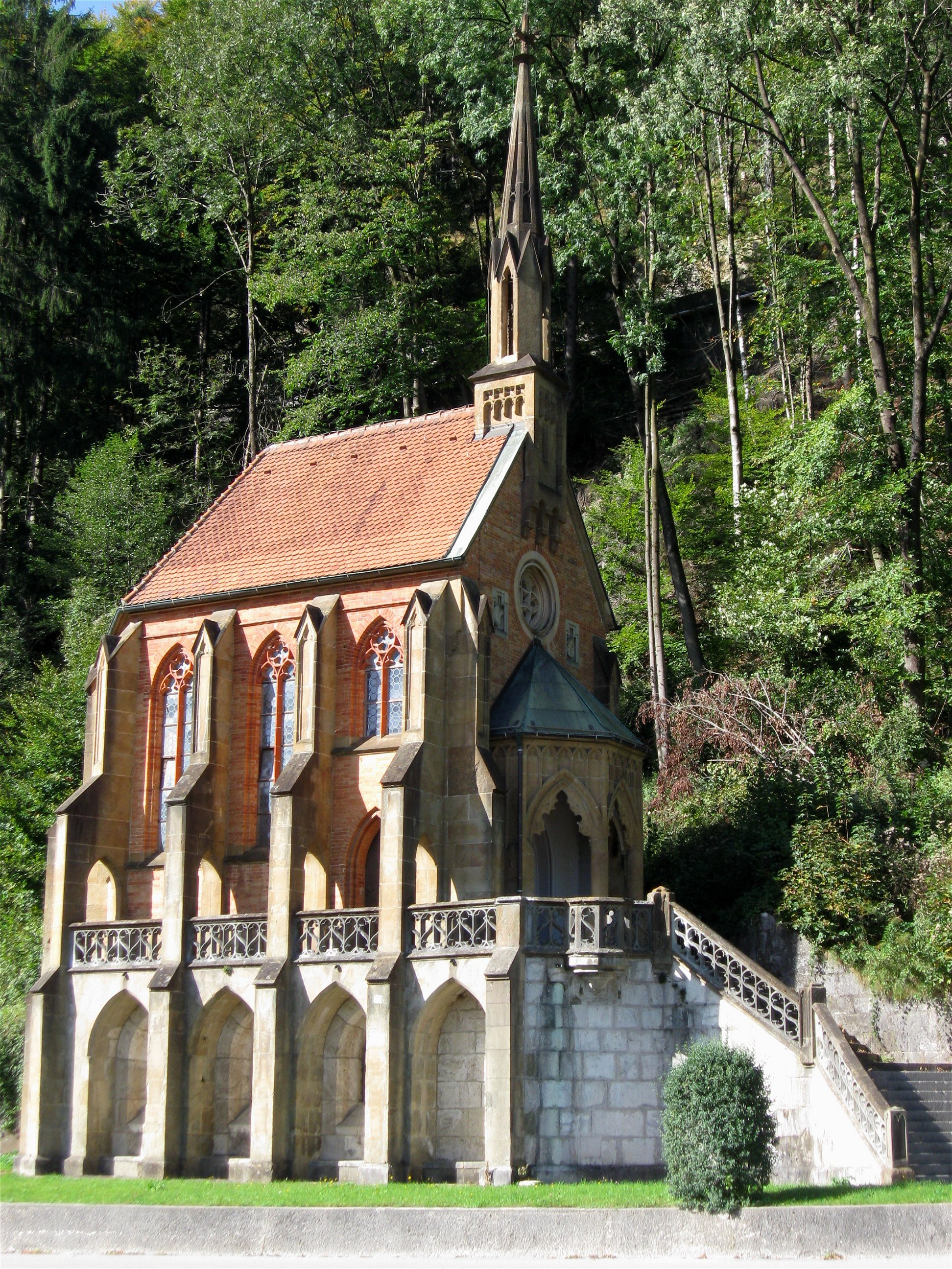 König-Otto-Straße 52. Kath. St. Otto-Kapelle, Saalbau mit Satteldach, nordöstlichem Dachreiter mit Spitzhelm, Vorhalle und Treppenanlage, Ziegelmauerwerk mit Werksteindetails, neugotisch, 1834 nach Plan von Joseph Daniel Ohlmüller; mit Ausstattung.